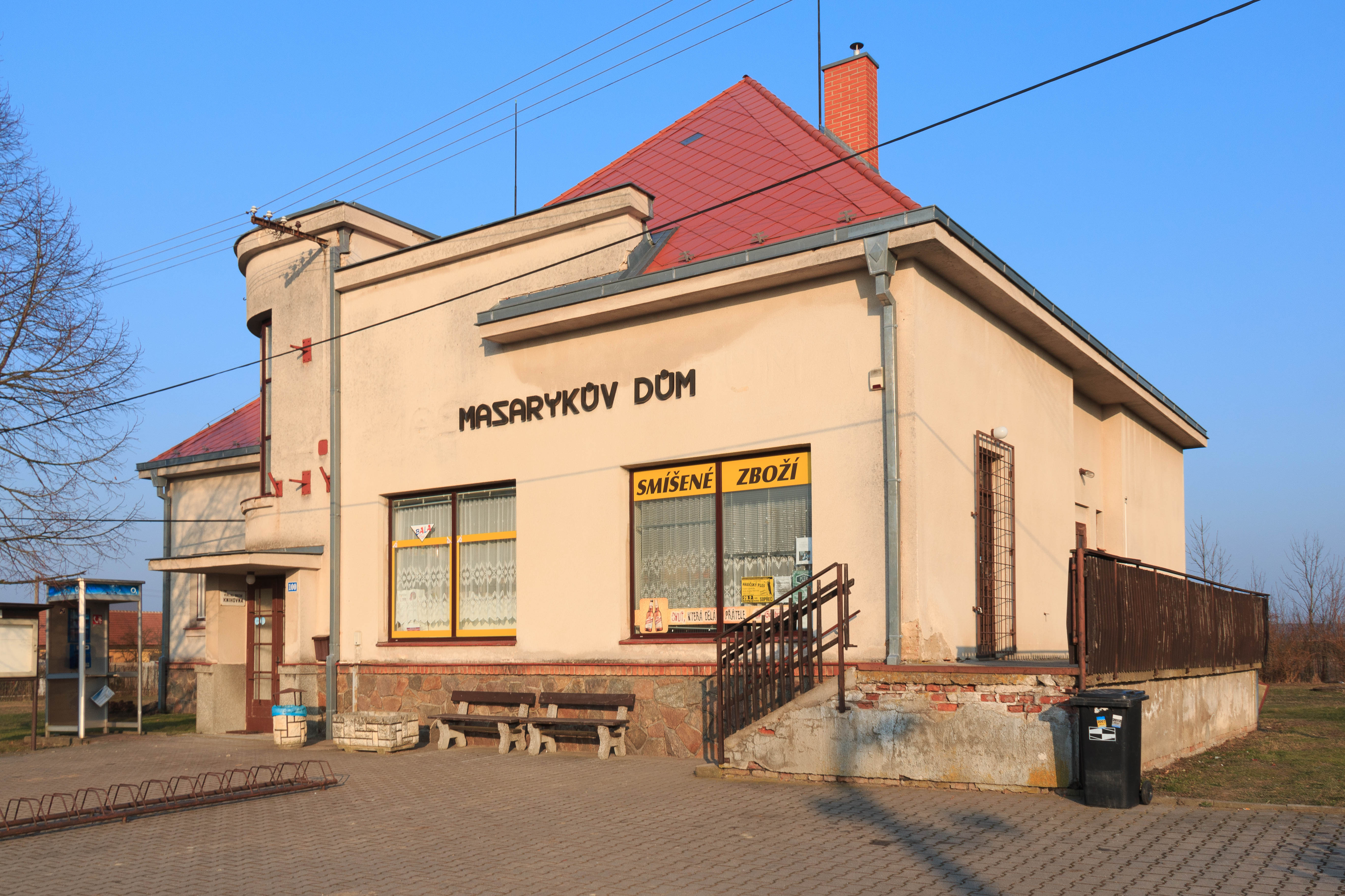 Sopřeč Masarykův dům